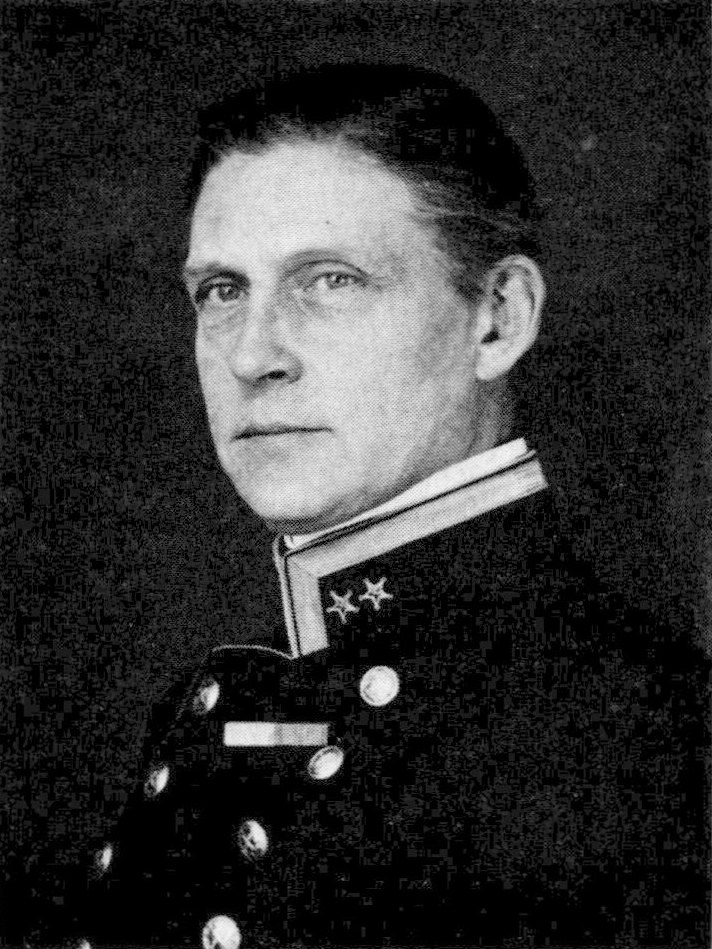 Generallöjtnant Ernst af Klercker (1881-1955).